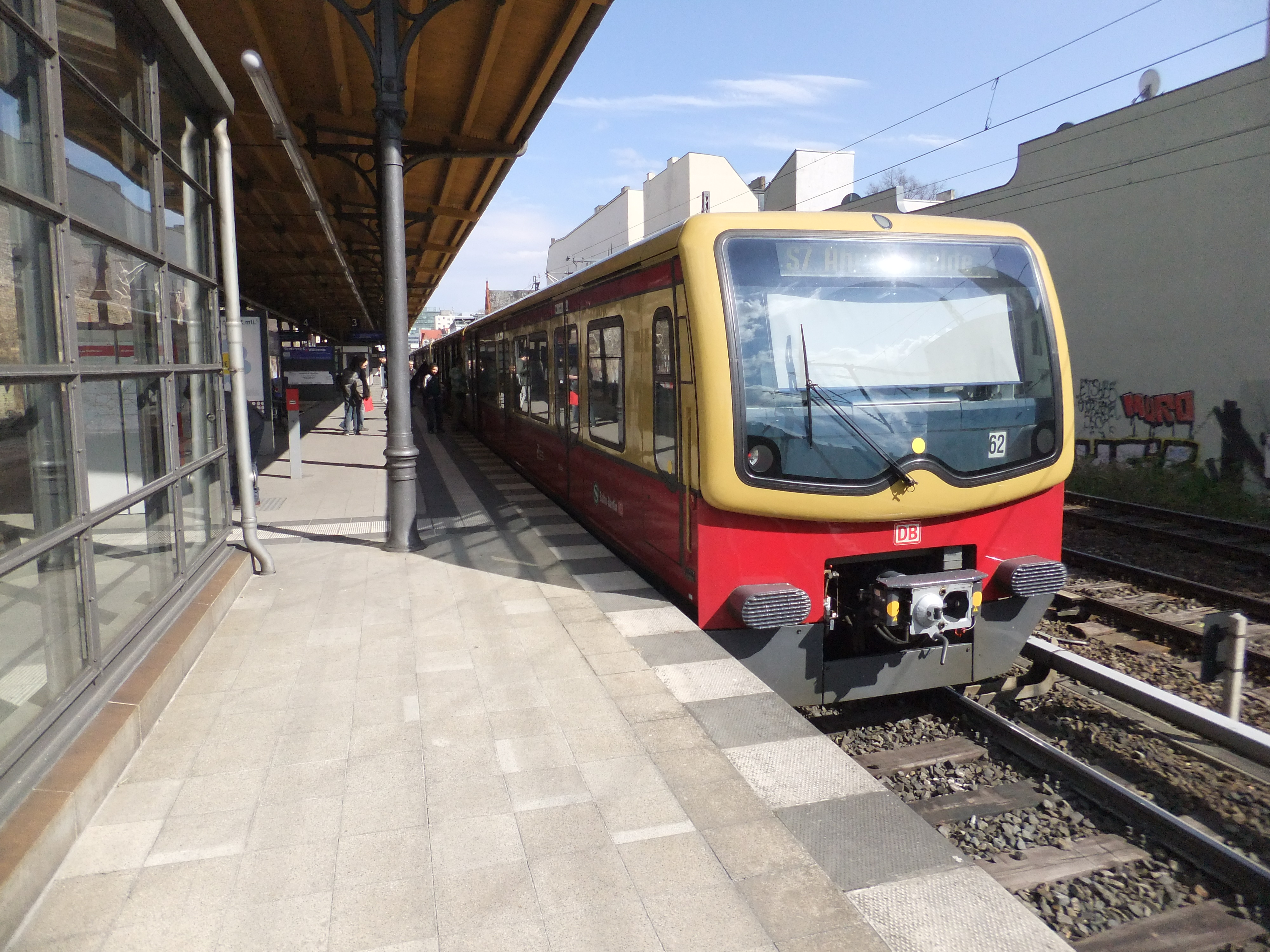 DBAG-Baureihe 481 im Bahnhof Berlin Savignyplatz